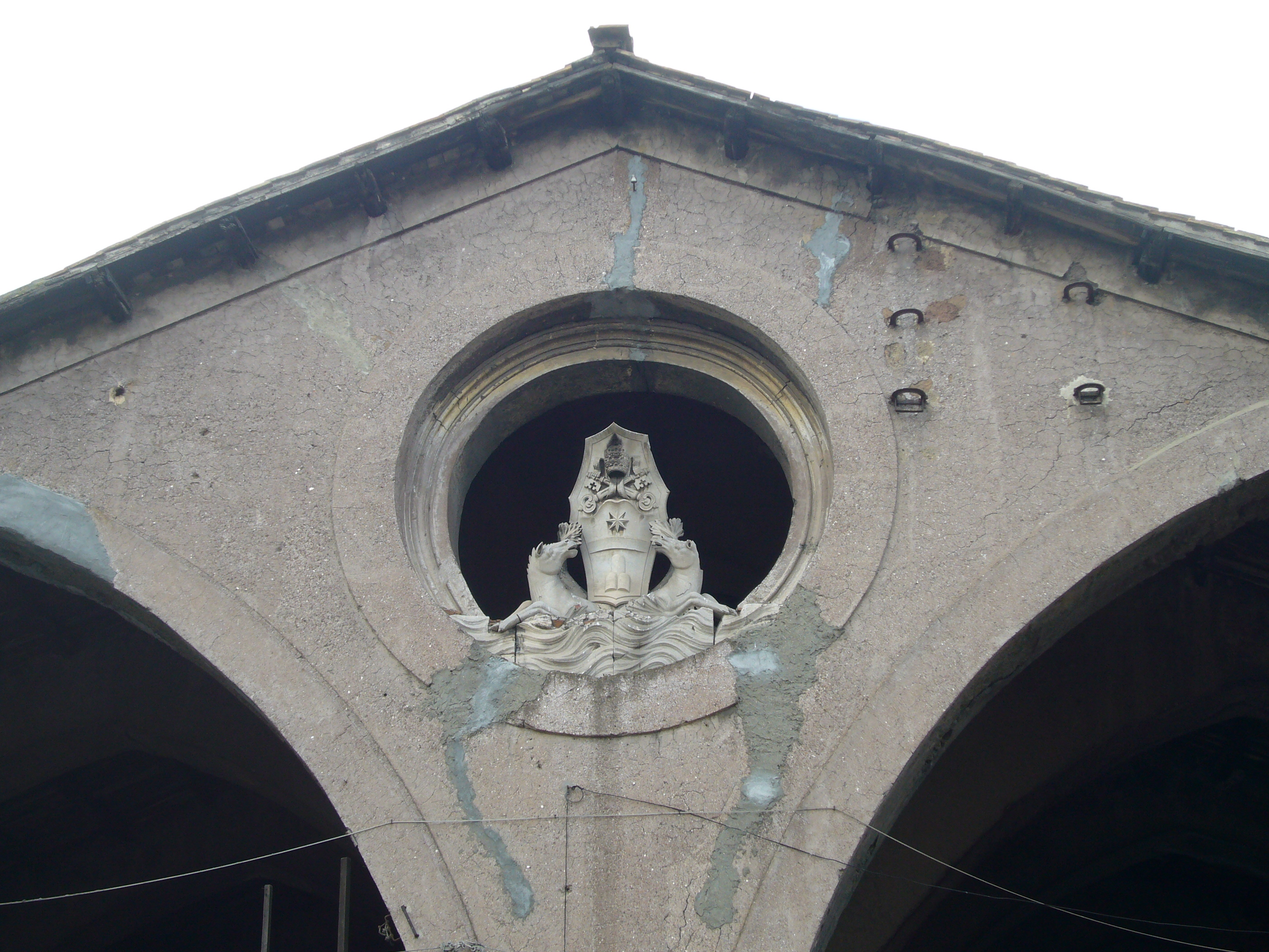 Roma, Arsenale di Ripa Grande a Porta Portese: stemma di Clemente XI